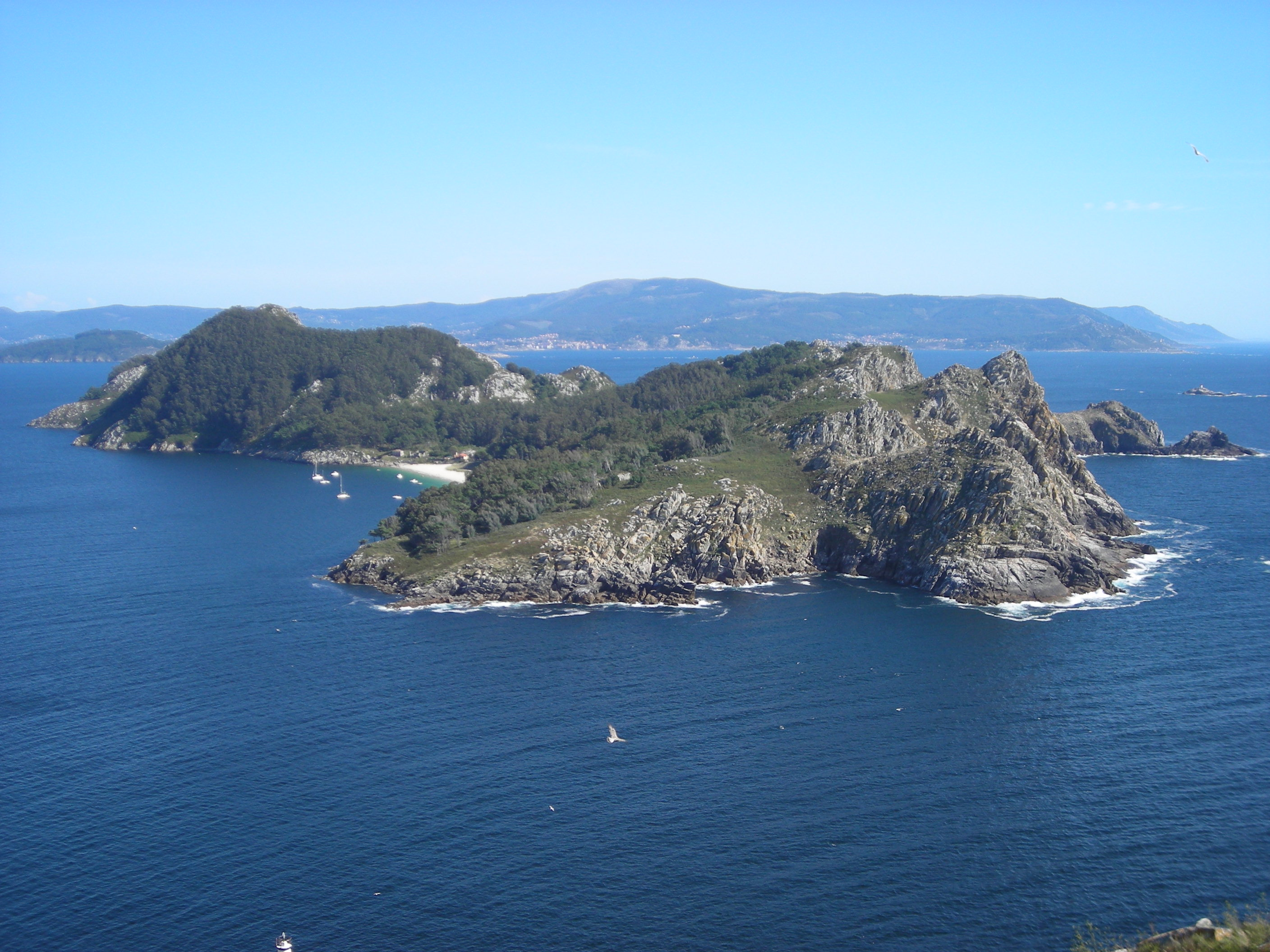 Illa de San Martiño, Cíes, Vigo